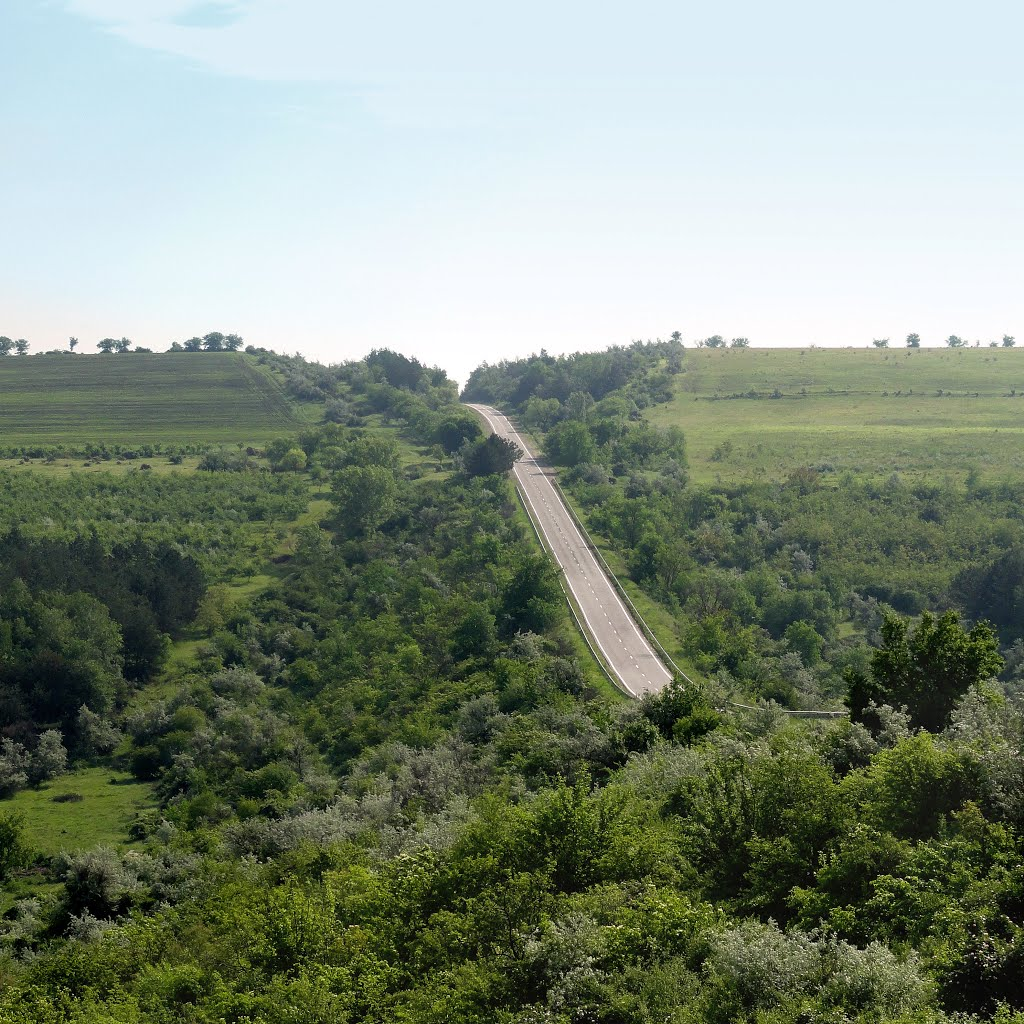 Magistrala 21, lângă satul Zăicana